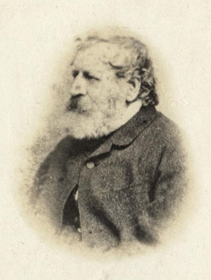 Portret van jhr. Pieter van Loon, geboren 1801, amateur tekenaar te Utrecht, overleden 1873. Borstbeeld links.